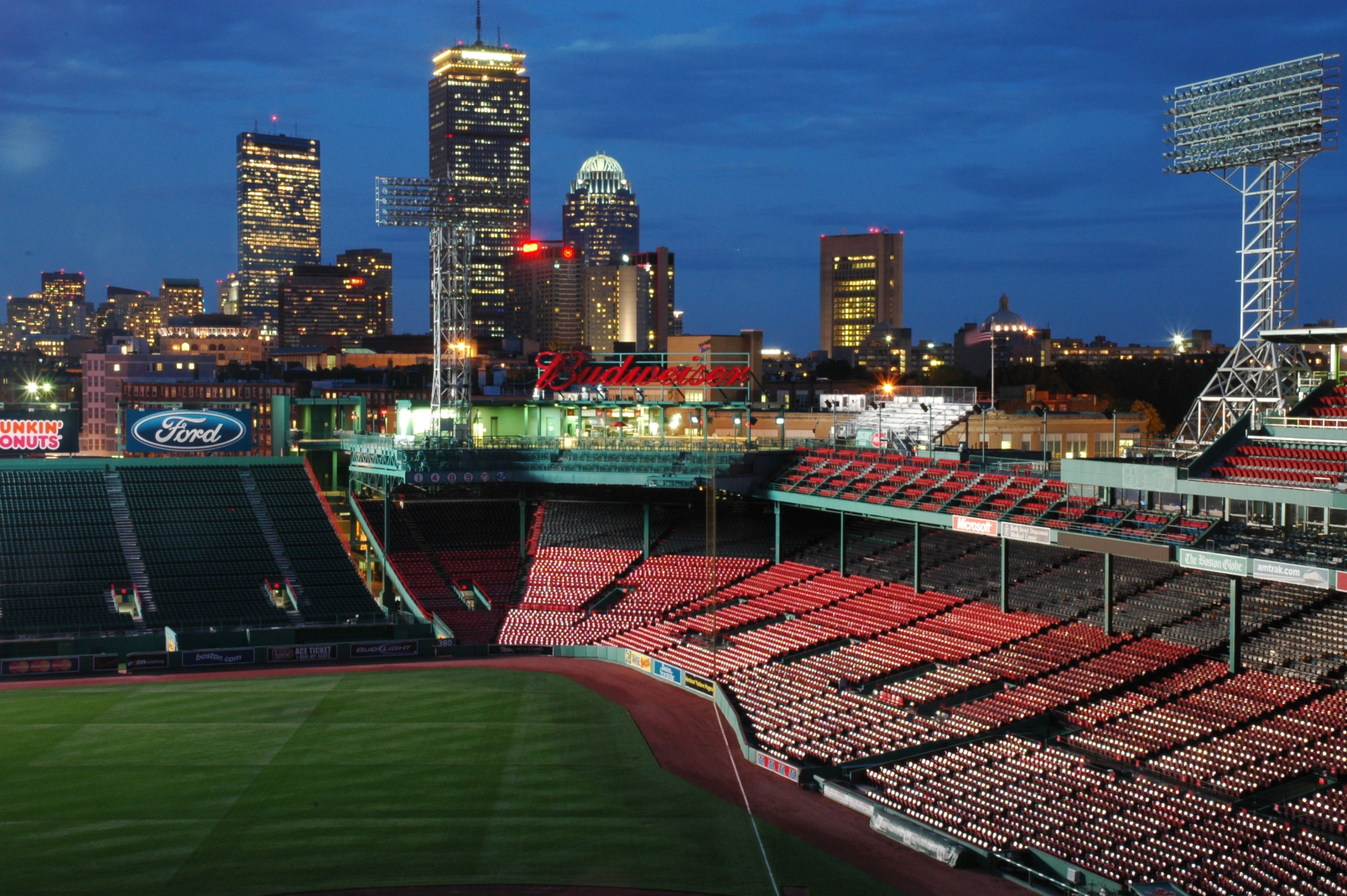 Fenway Park at night